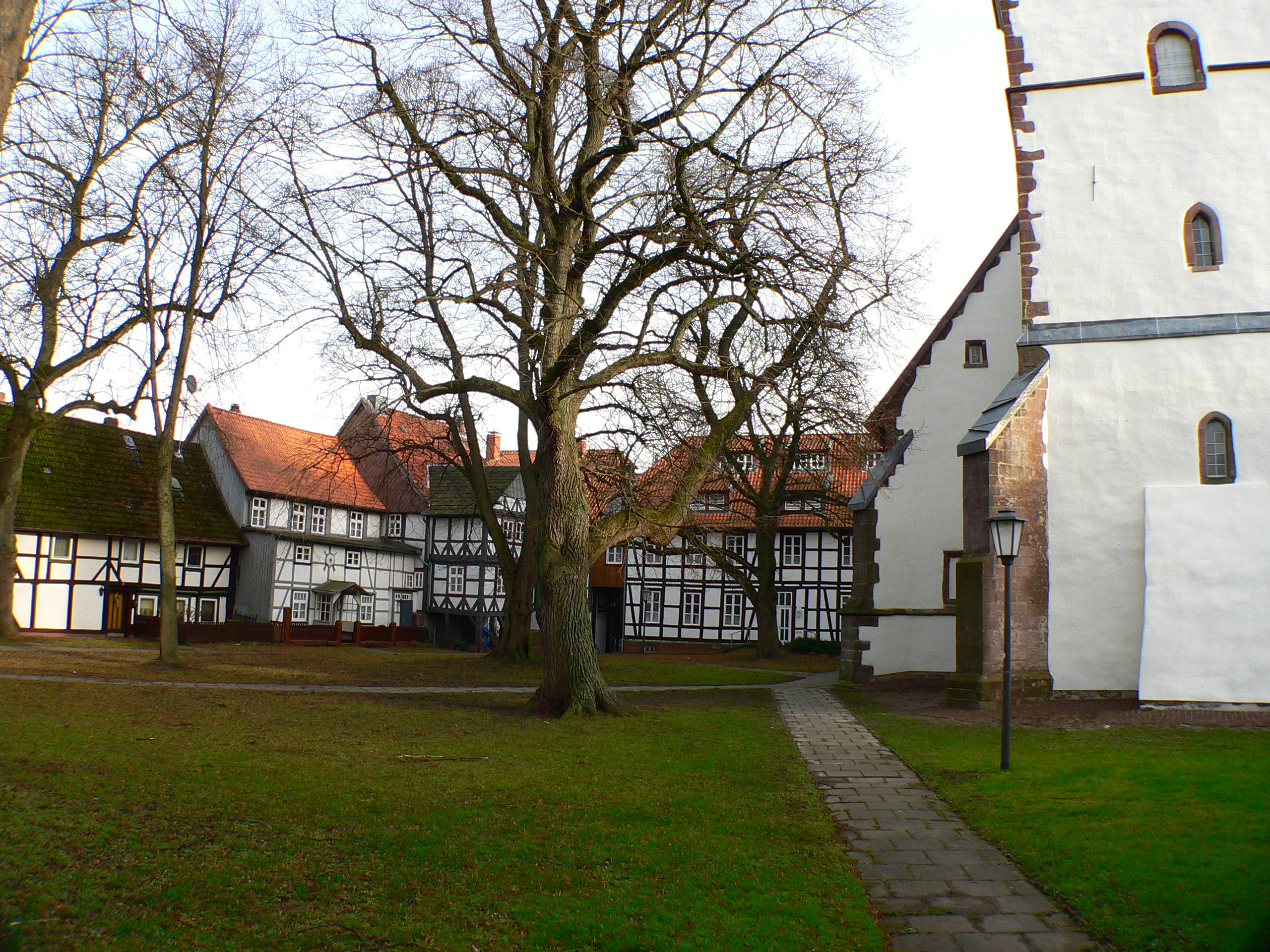 Evangelische Kirche St. Laurentius in Dassel, Niedersachsen, Deutschland - Kirchhof